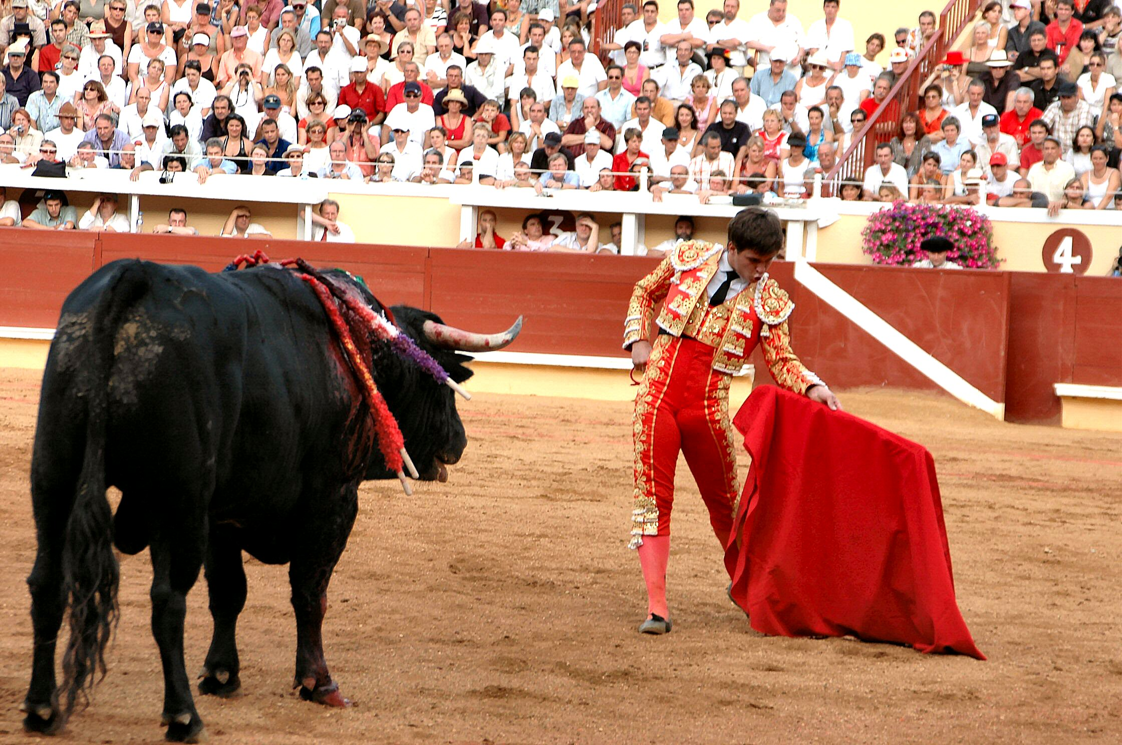 El Juli, Bayonne 5 Septembre 2004